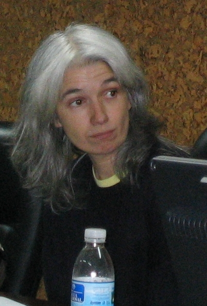 La escritora española Belén Gopegui en el curso de verano Teoría y Práctica de la Liberación de Conocimiento, Cáceres, España, julio de 2007.